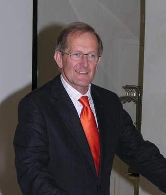 Joseph Deiss, Swiss Federal Councillor. Selber gemachtes Foto. Ende September in St. Gallen/CH.